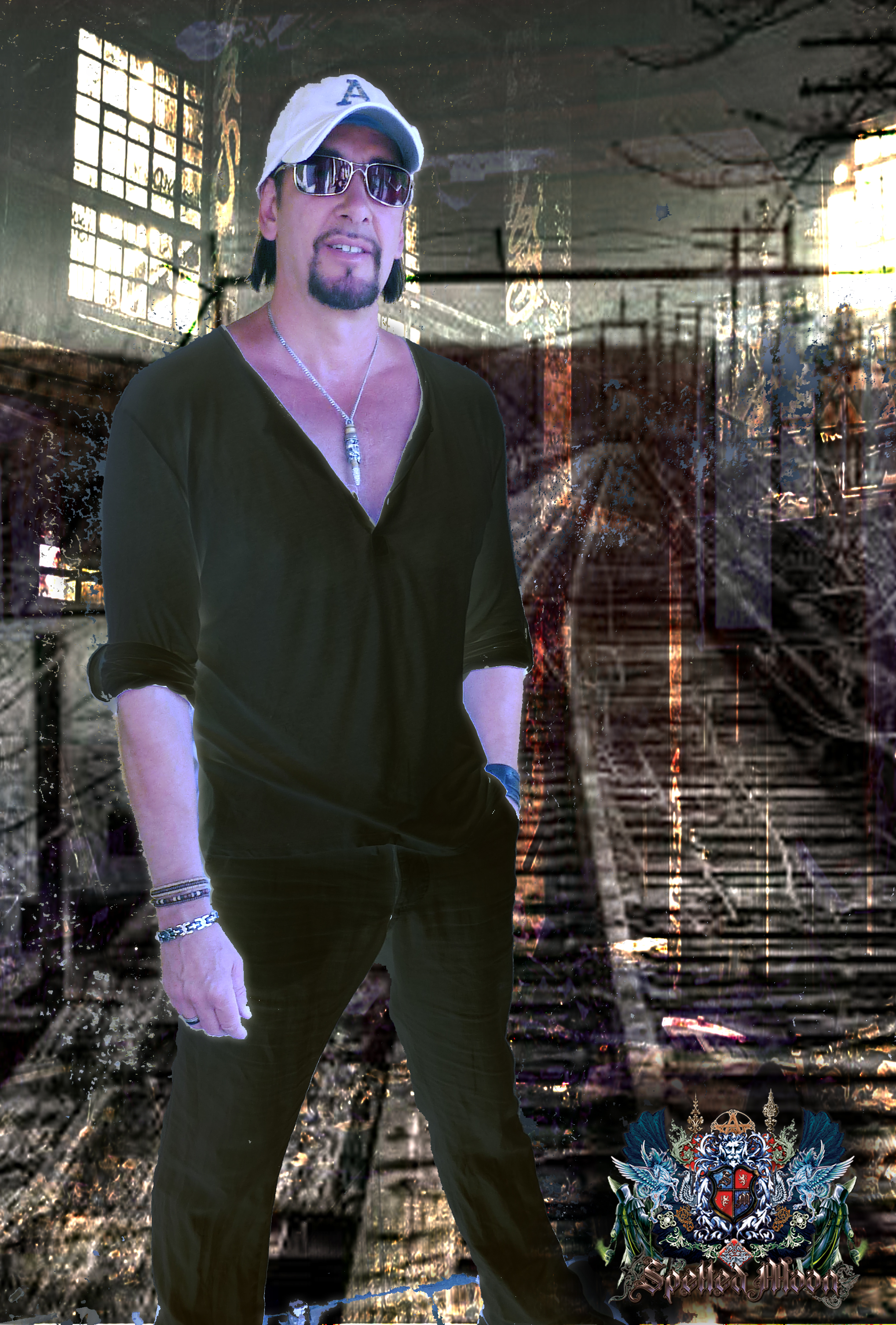 Ralph Rieckermann, bajista, miembro original, músico sesionista y colaborador activo de Spelled Moon, grupo estadounidense de heavy metal tradicional y power metal épico, originario de Los Ángeles (California), (Estados Unidos).